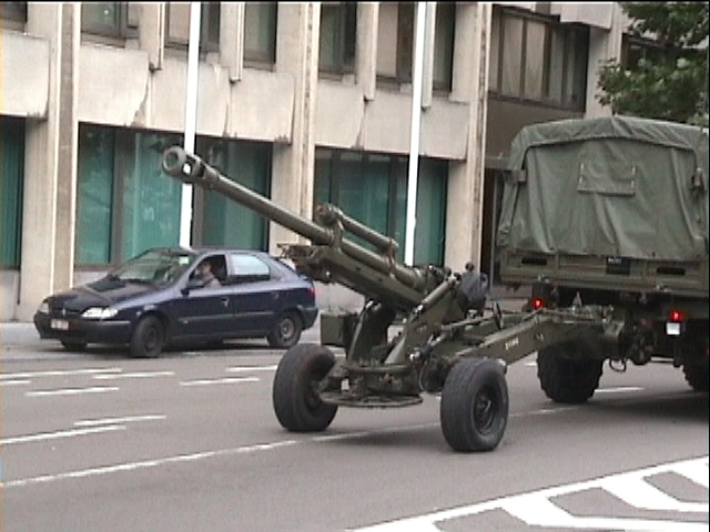 Obusier 105 mm tracté de l'armée Belge Photo prise par le contributeur